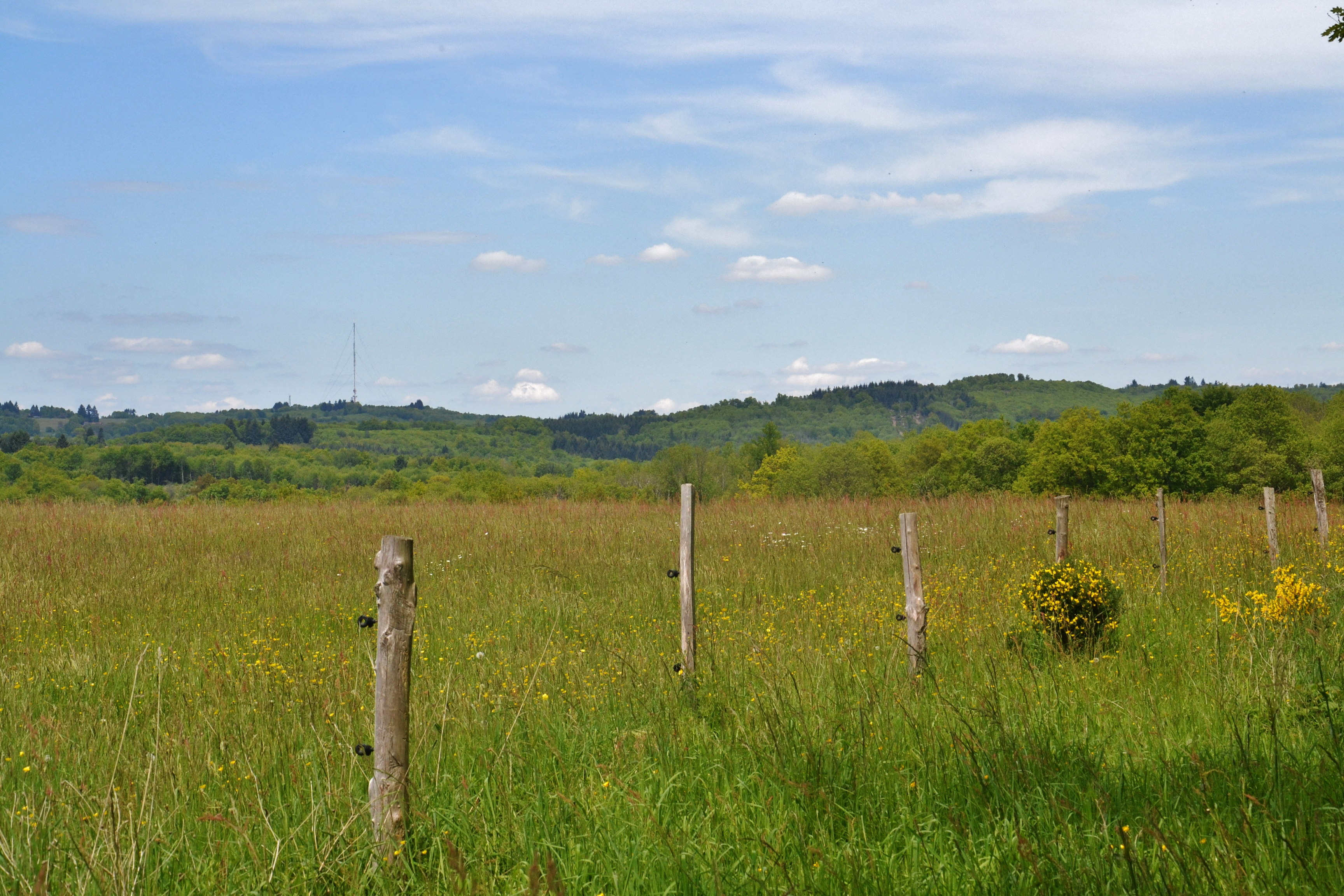 L'antenne et les monts des Cars. Vue depuis Puy-Besseau (Bussière-Galant, Haute-Vienne)